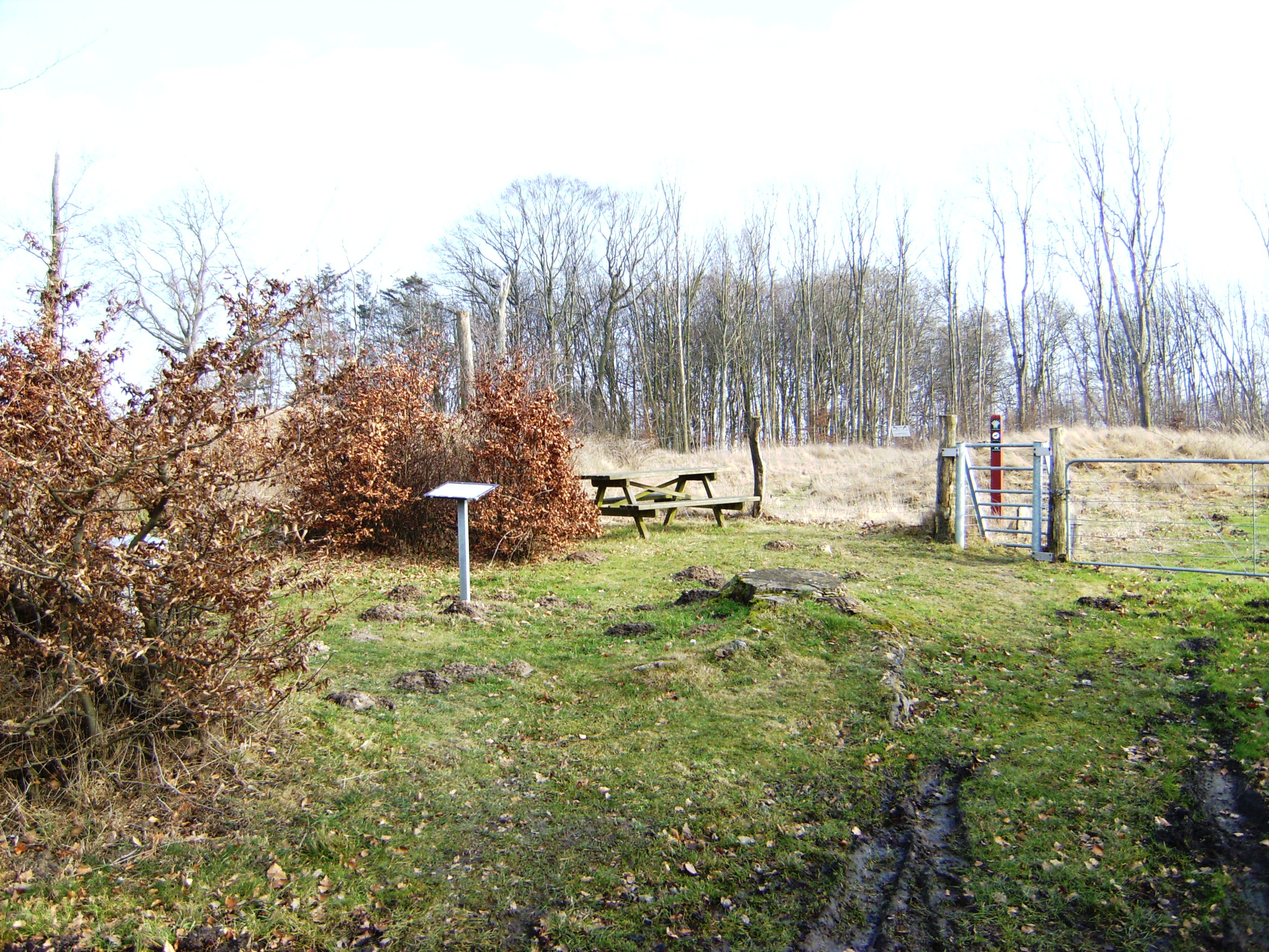 Højene (Godsted sogn) er en samling på 43 bronzealdergrave fra 1000-500 f.Kr. Som 43 graves from 1000-500 B.C (Denmark, Lolland)